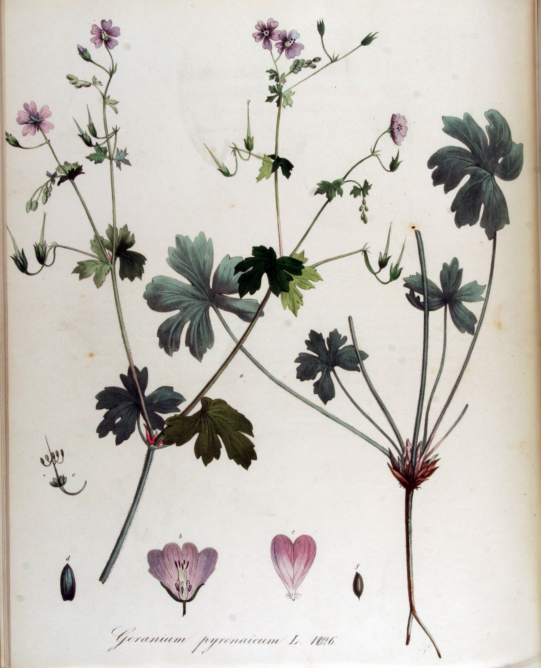 Geranium pyrenaicum Burm. f.